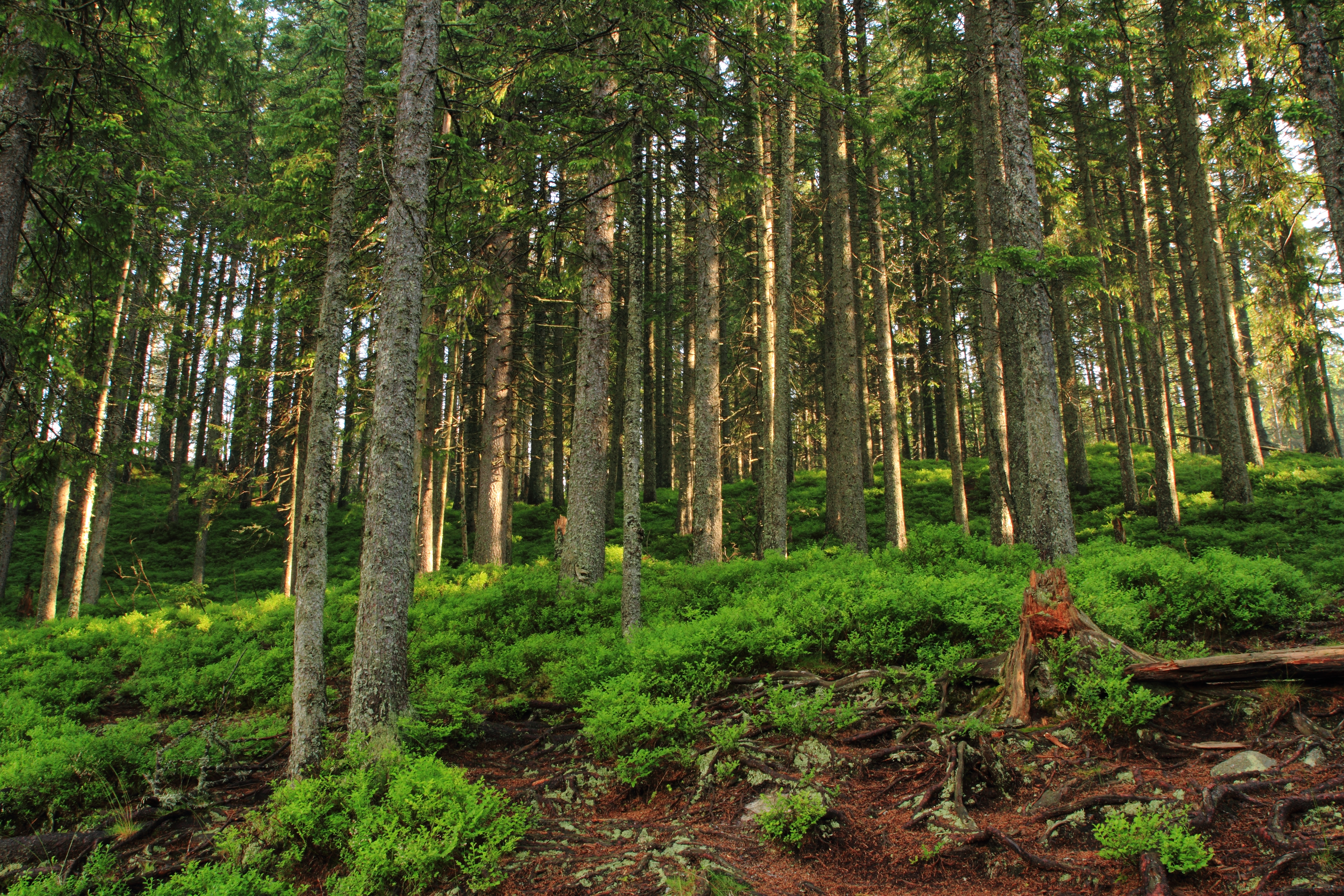 Obszar specjalnej ochrony ptaków Tatry. This is a photography of Natura 2000 protected area with ID PLC120001